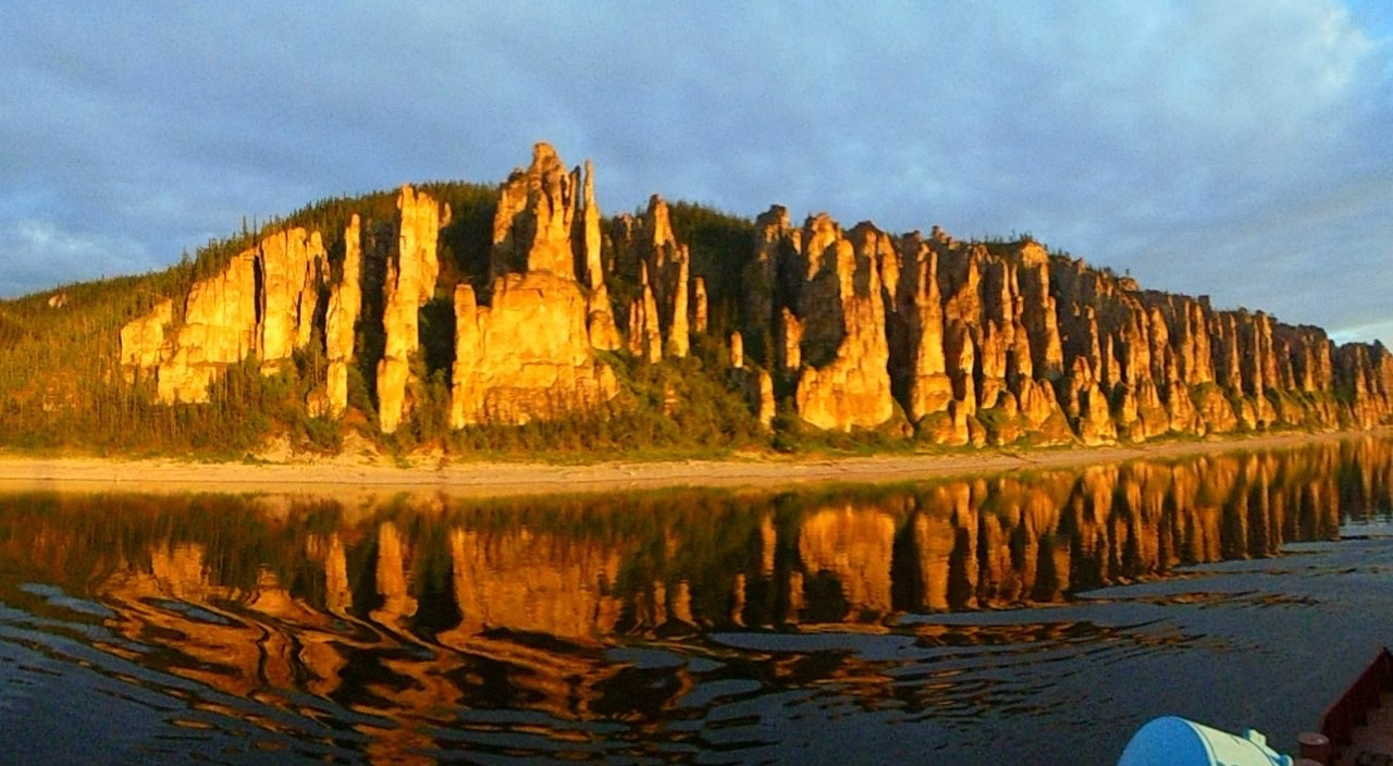 Ленские столбы, Олёкминский район This image is related to the protected area of Russia number 1400171